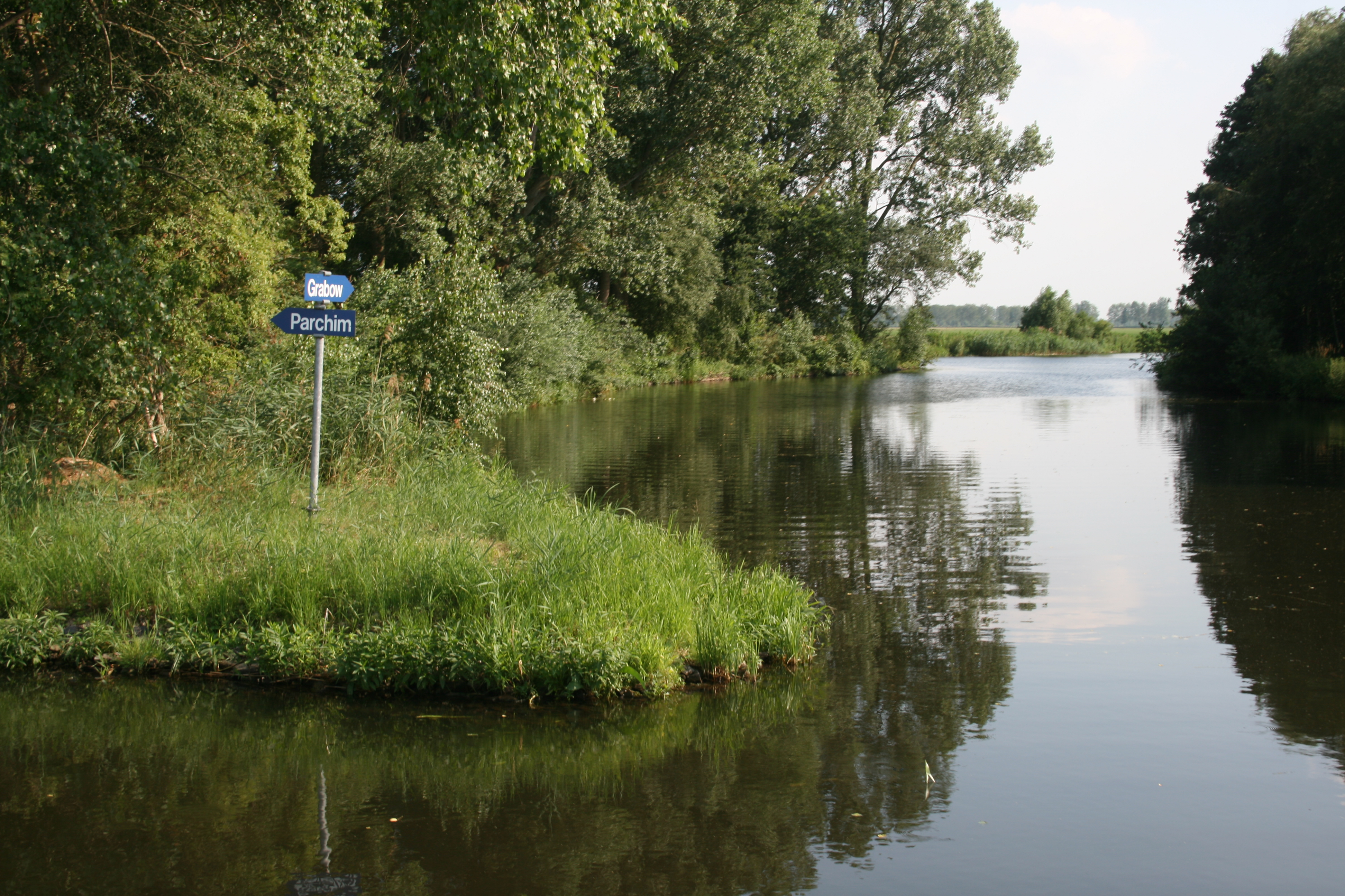 Das Elde-Dreieck verbindet die Stör-Wasserstraße, die Müritz-Elde-Wasserstraße und den zu ihr gehörenden Eldekanal (Friedrich-Franz-Kanal)